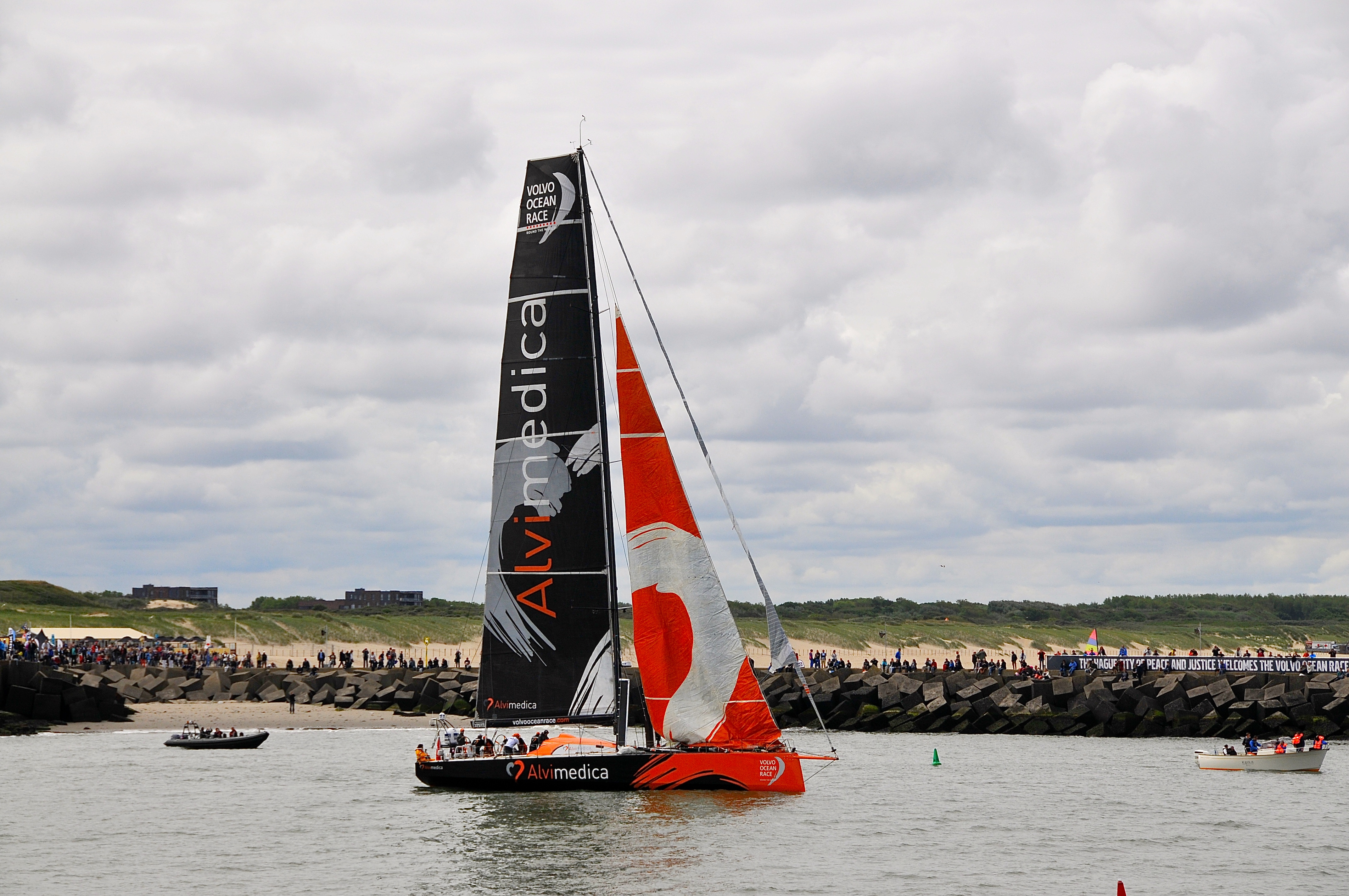 Vertrek van de koploper, Team AlviMedica (captain Charlie Enright, USA), uit de haven van Scheveningen.